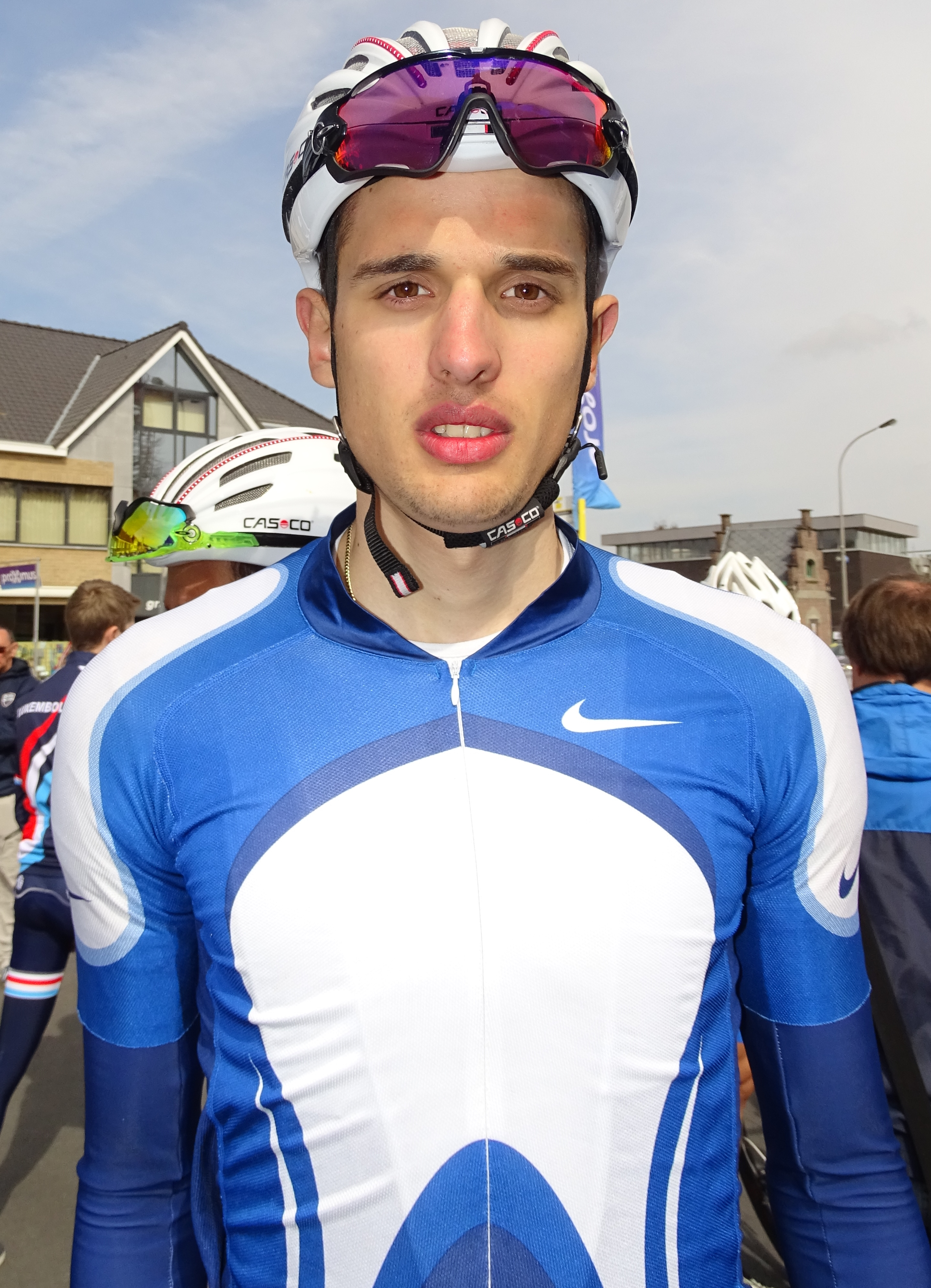 Reportage réalisé le samedi 9 avril à l'occasion du départ et de l'arrivée du Tour des Flandres espoirs 2016 à Audenarde, Belgique.